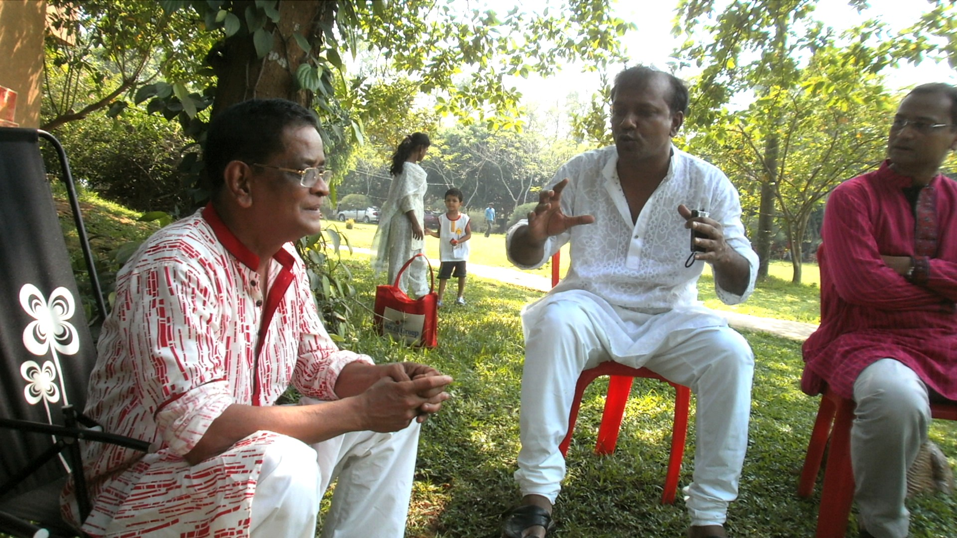 নুহাশ পল্লীর বৃক্ষছায়ায় হুমায়ূন আহমেদ